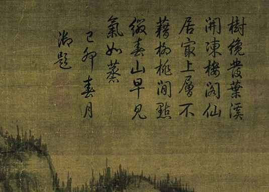 Го Си. 1072г Тайбей.